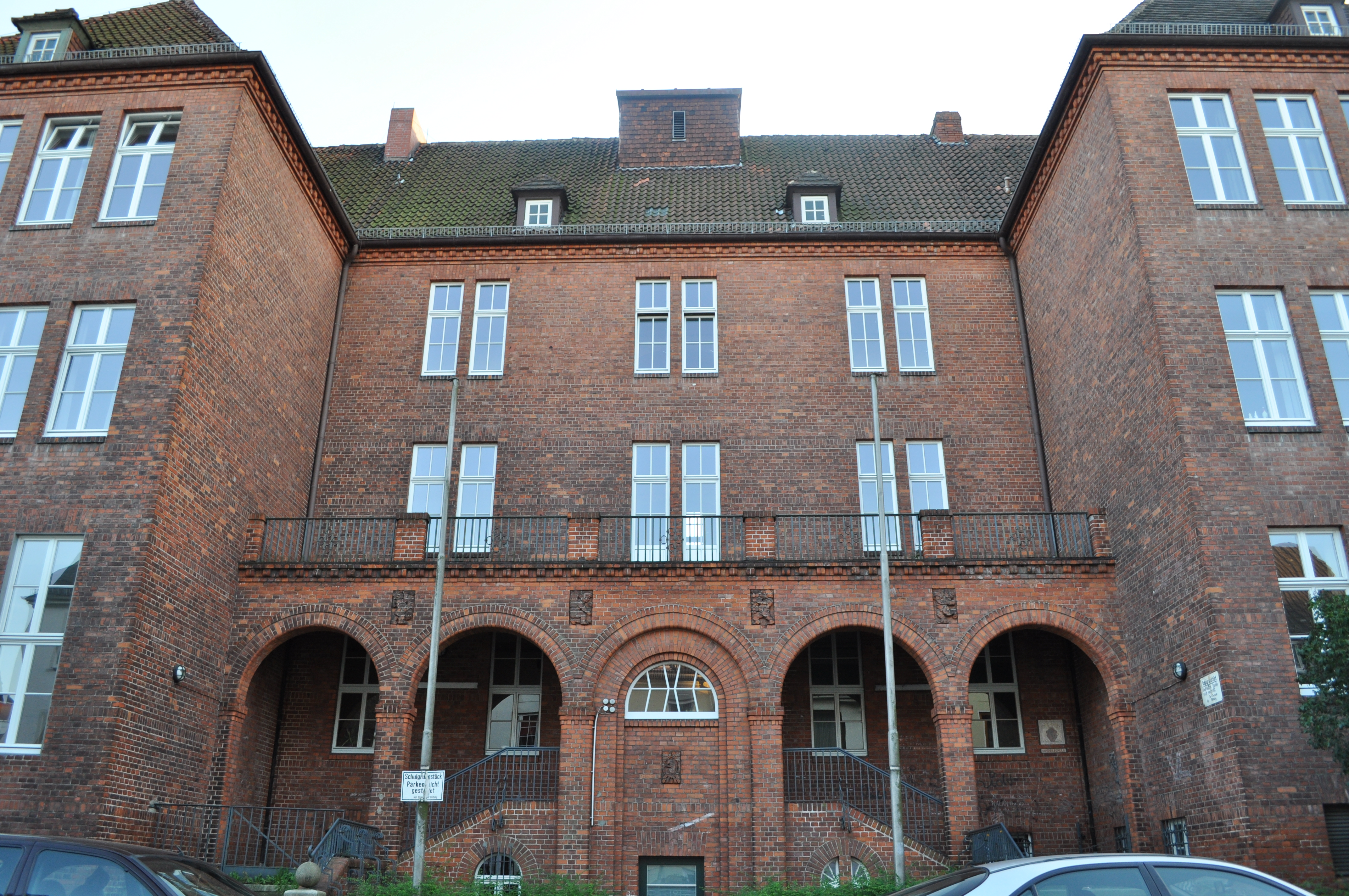 Hilfsschule in Bremen, Gothaer Straße o.Nr..Das abgebildete Objekt ist ein geschütztes Kulturdenkmal in der Freien Hansestadt Bremen, mit der Nr. 0452 beim Landesamt für Denkmalpflege registriert.